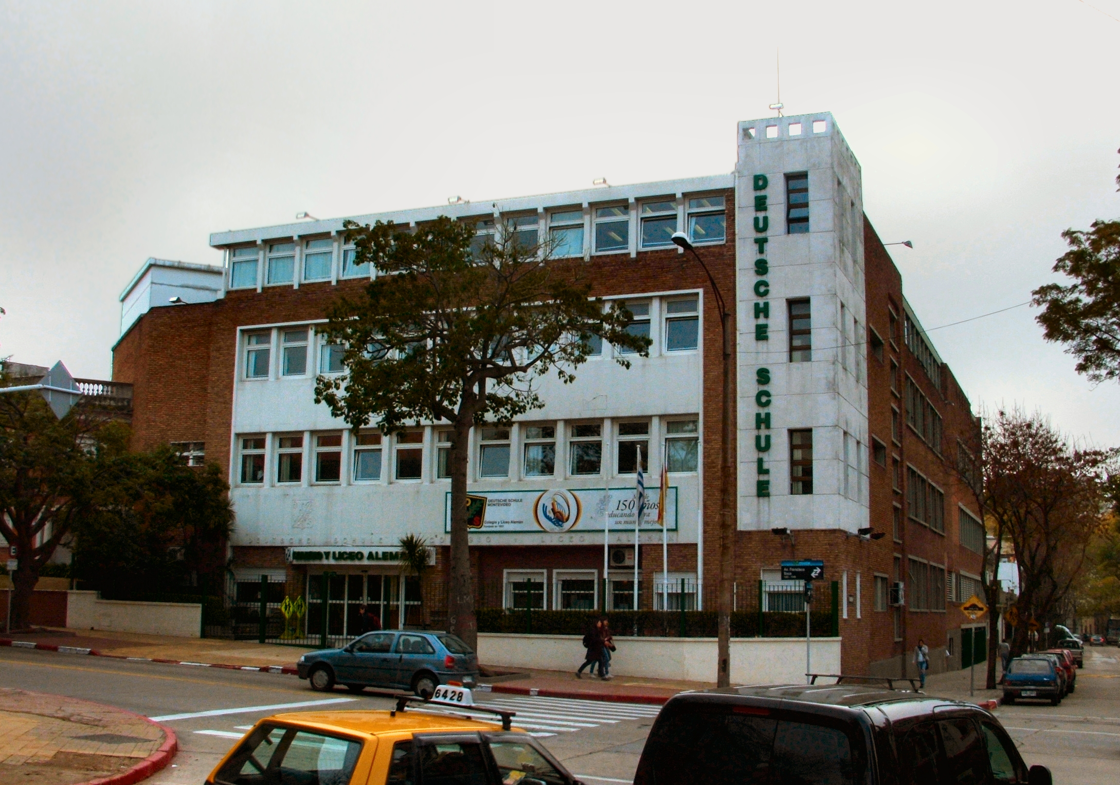 Deutsche Schule Montevideo, Av. Dr. Francisco Soca 1356, Pocitos, Montevideo. Gegründet 1857. Gebäude des 20. Jahrhunderts, Achitekt: Antonio Cravotto.